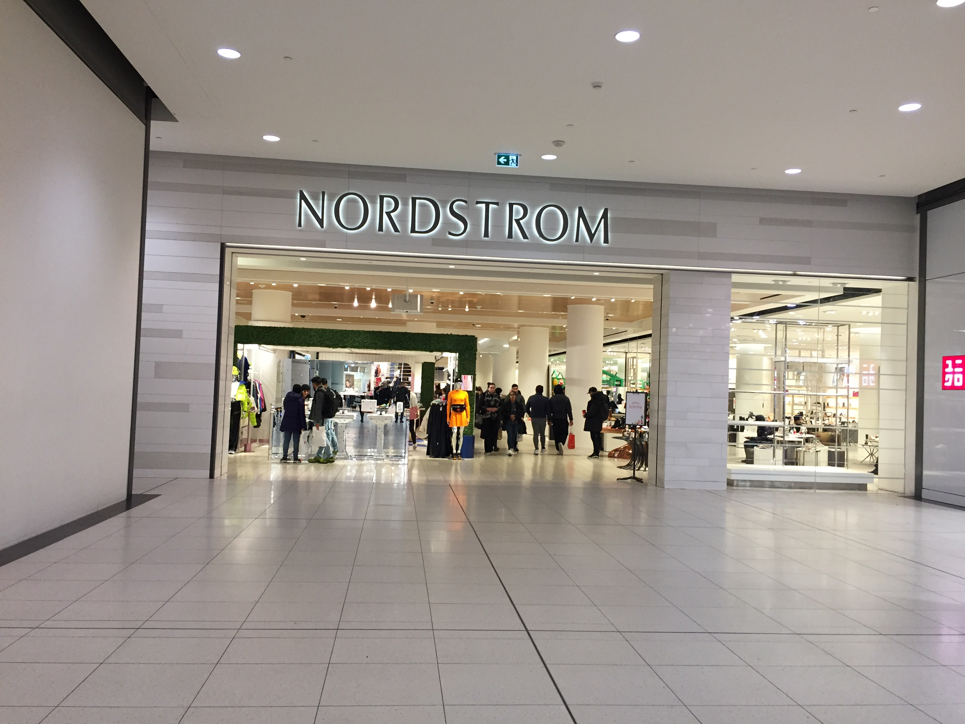 کوردی: یەکێک لە دەروازەکانی نۆرد سترۆم لە تۆرەنتۆ